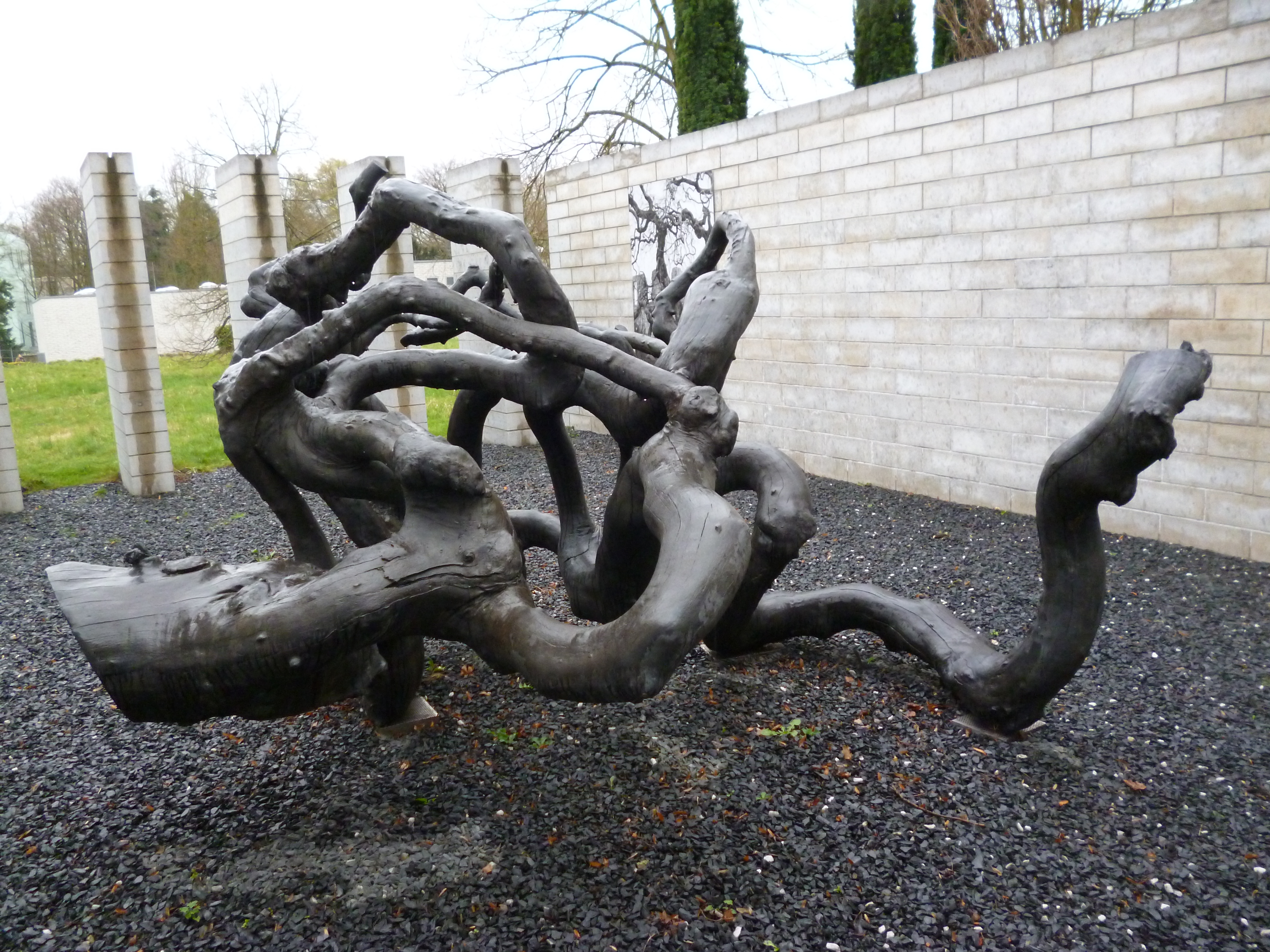 Situation Kunst in Bochum-Weitmar: Bronzeguss des Astes des ältesten Baums Bochums, eine 1740 gepflanzte Süntelbuche aus dem angrenzenden Park von Haus Weitmar, die 2000 durch Brandstiftung zerstört wurde.